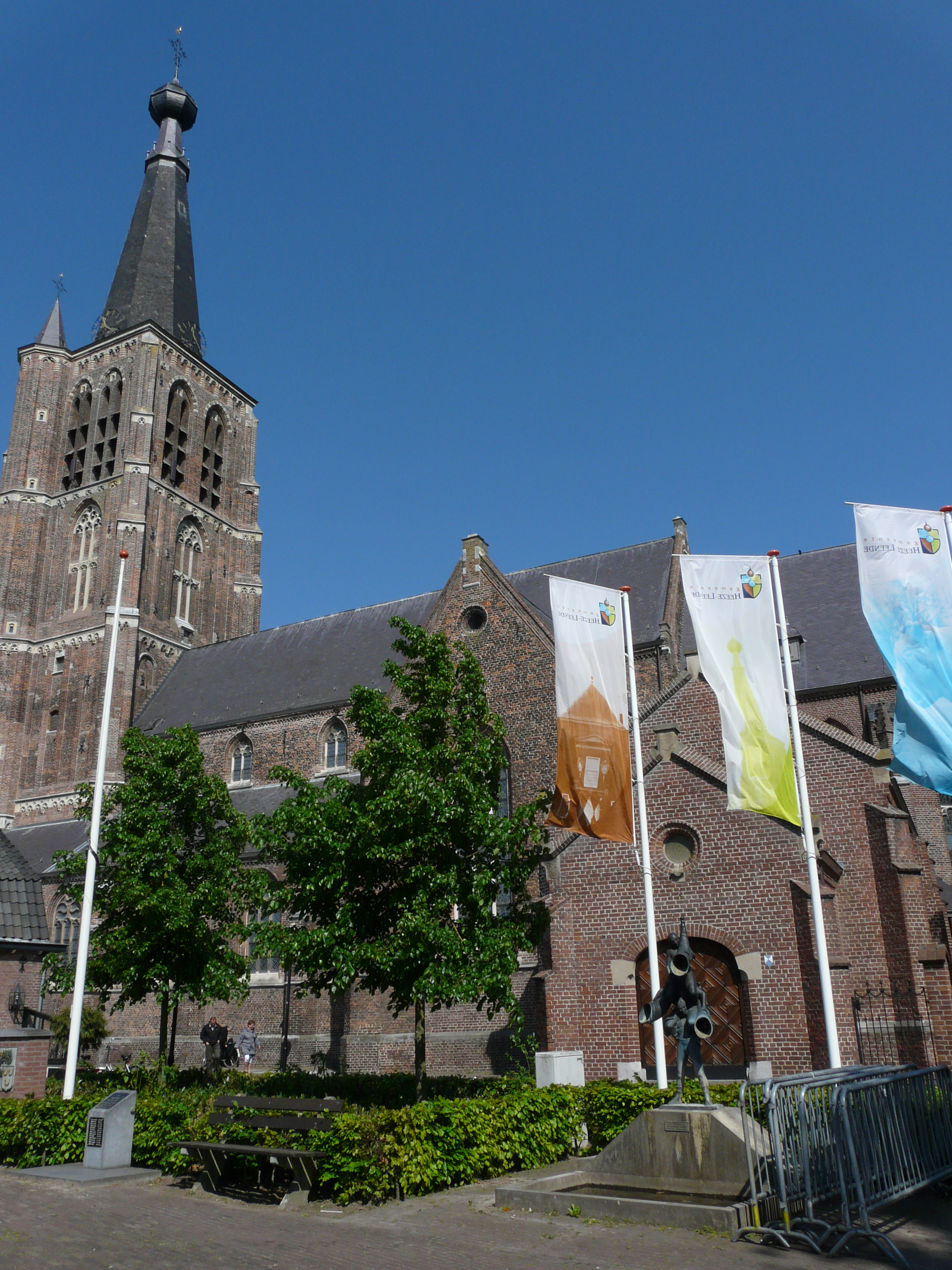 Sint-Petrus'-Bandenkerk in Leende